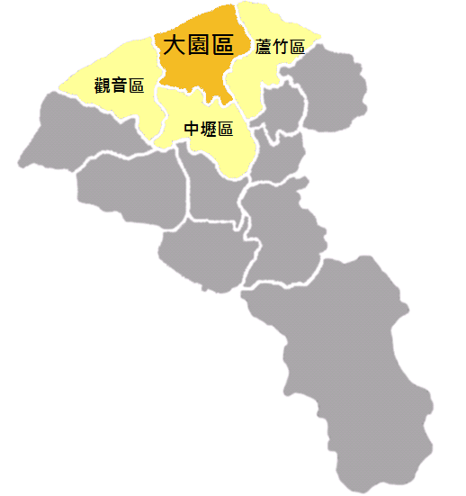 大園區位置圖